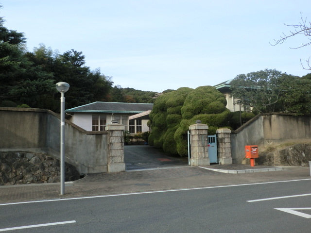 八幡製鉄所の迎賓や社交の場である高見倶楽部です。